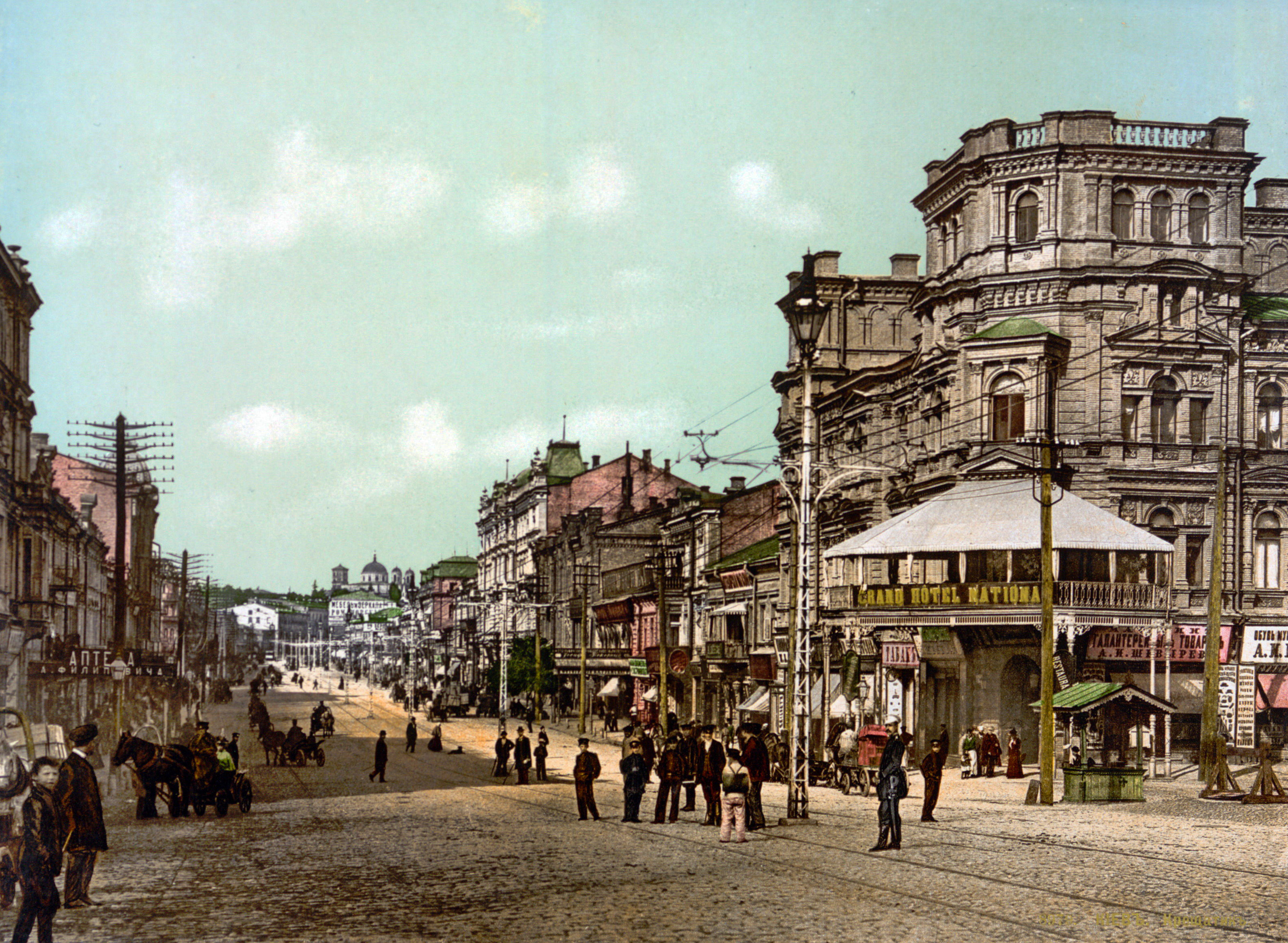 Готель «Національ» (справа) Хрещатик. Київ